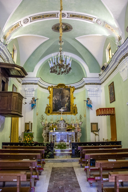 Interno della chiesa di Sant'Erasmo a Torrecuso, in provincia di Benevento